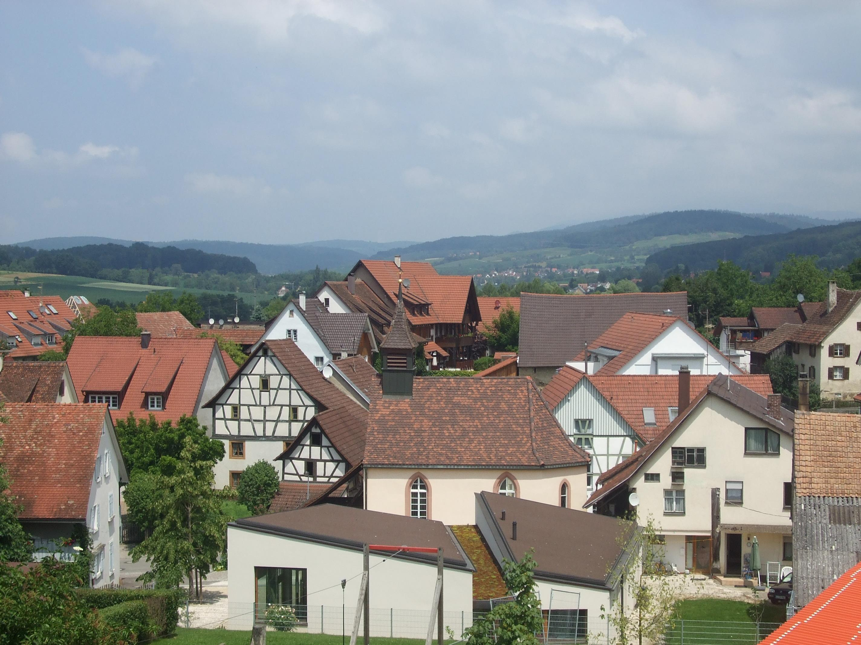 alter Dorfkern Rümmingen, im Hintergrund der Hochblauen